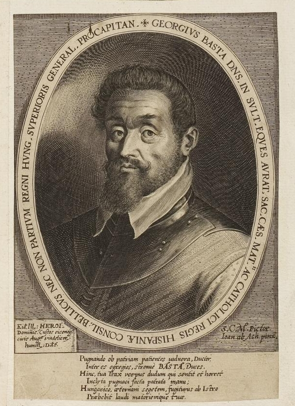 Grafik aus dem Klebeband Nr. 1 der Fürstlich Waldeckschen Hofbibliothek Arolsen Motiv: Giorgio Bastia